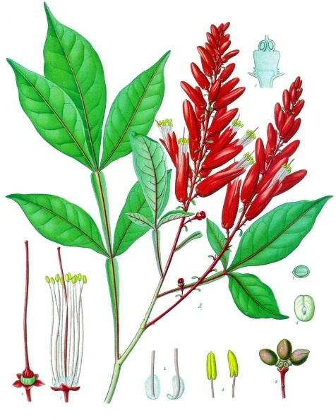 Bitterholzbaum. A blühender Zweig, nat. Grösse; 1 Blüthe ohne Krone, vergrössert; 2 Basis der Staubgefässe, desgl.; 3 Staubbeutel von verschiedenen Seiten, desgl.; 4 Kelch mit Stempelträger und Stempel, desgl.; 5 unterer Theil dieser Figur im Längsschnitt, desgl.; 6 Früchte, nat. Grösse; 7 Samen im Quer- und Längsschnitt.